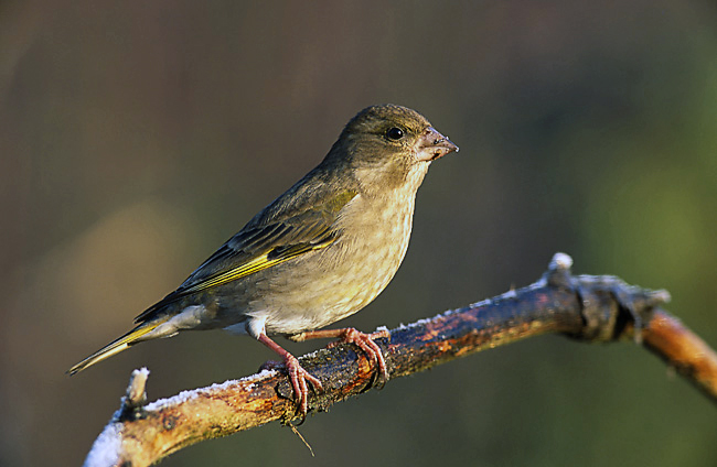 Carduelis chloris